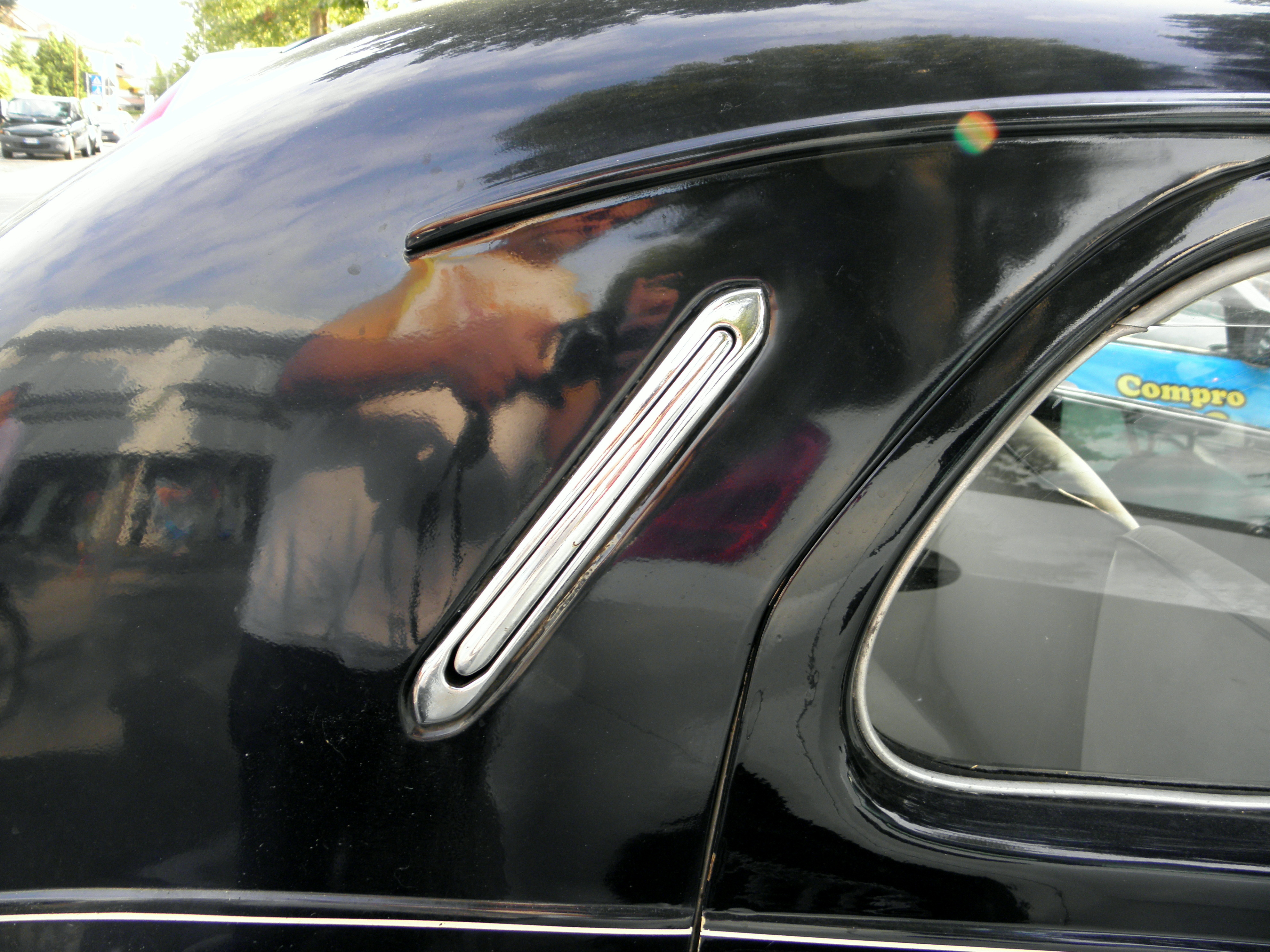 Rovigo, Via Fuà Fusinato: dettaglio bacchetta direzionale di destra di una Lancia Ardea (quarta serie?) parcheggiata sulla via.